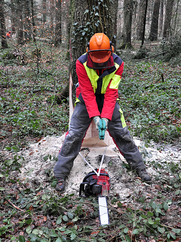 Festlegen der Fallrichtung